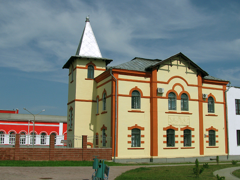 Беларуская (тарашкевіца): Кантора фабрыкі «Спартак». г. Шклоў This is a photo of Belarusian heritage monument. Reference number: 513Г000573 ( WLM)